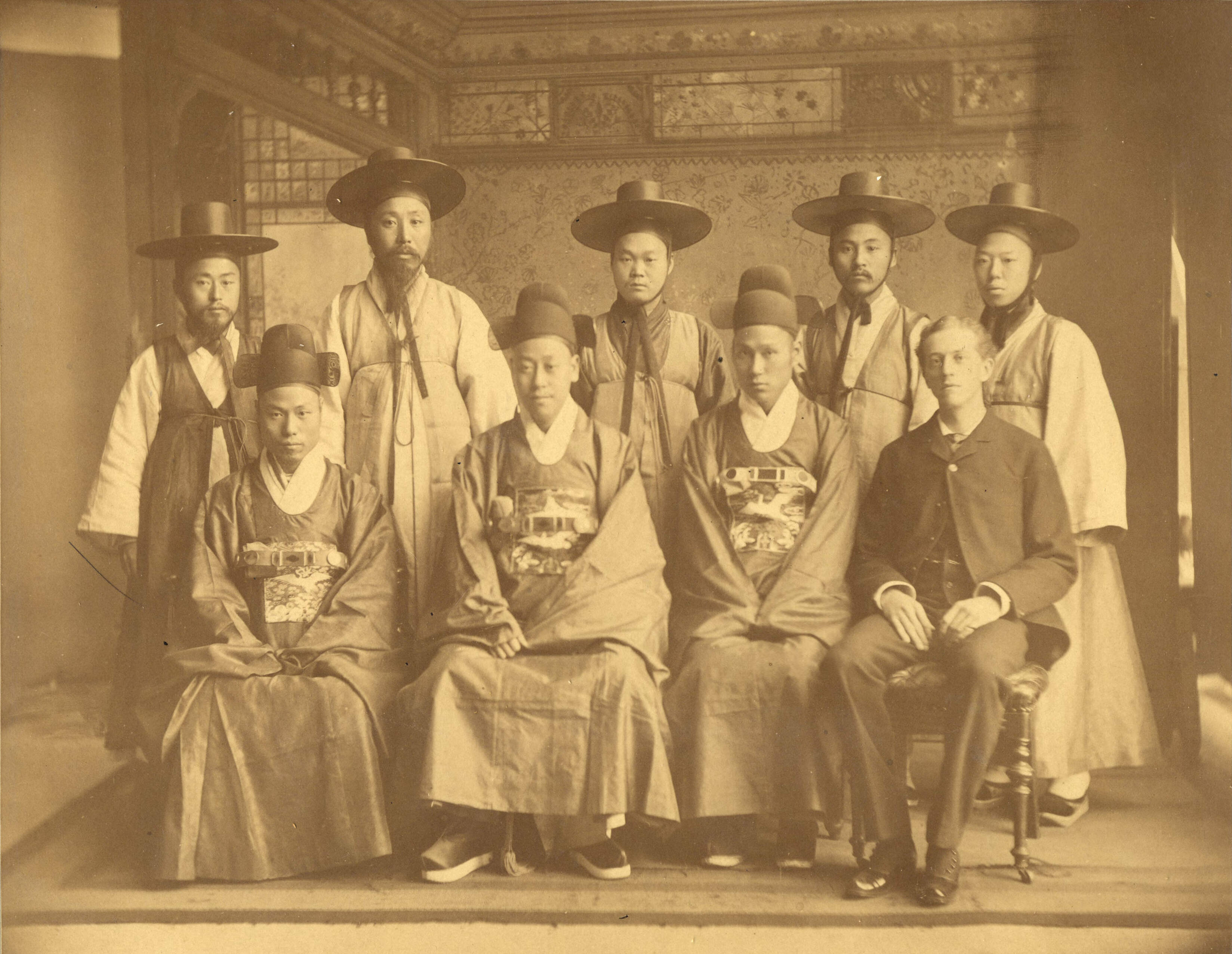 中文（台灣）: 李氏朝鮮第一任駐美報聘大使一行人